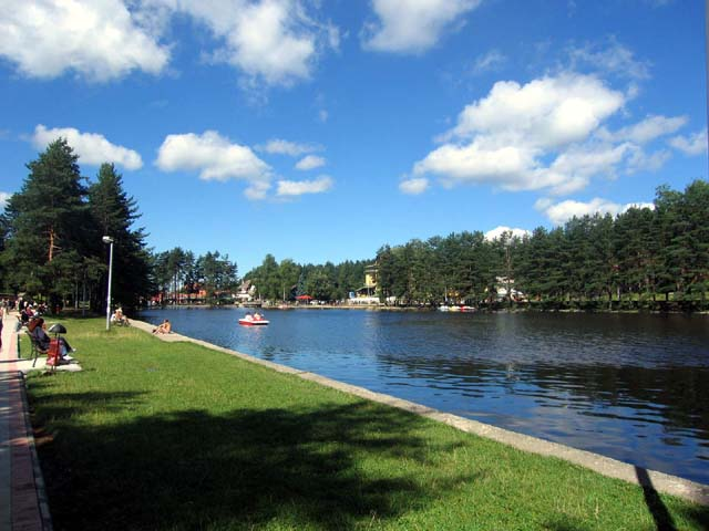 Description:Природне лепоте Златибора author: Snezana Trifunovic Source: self-made